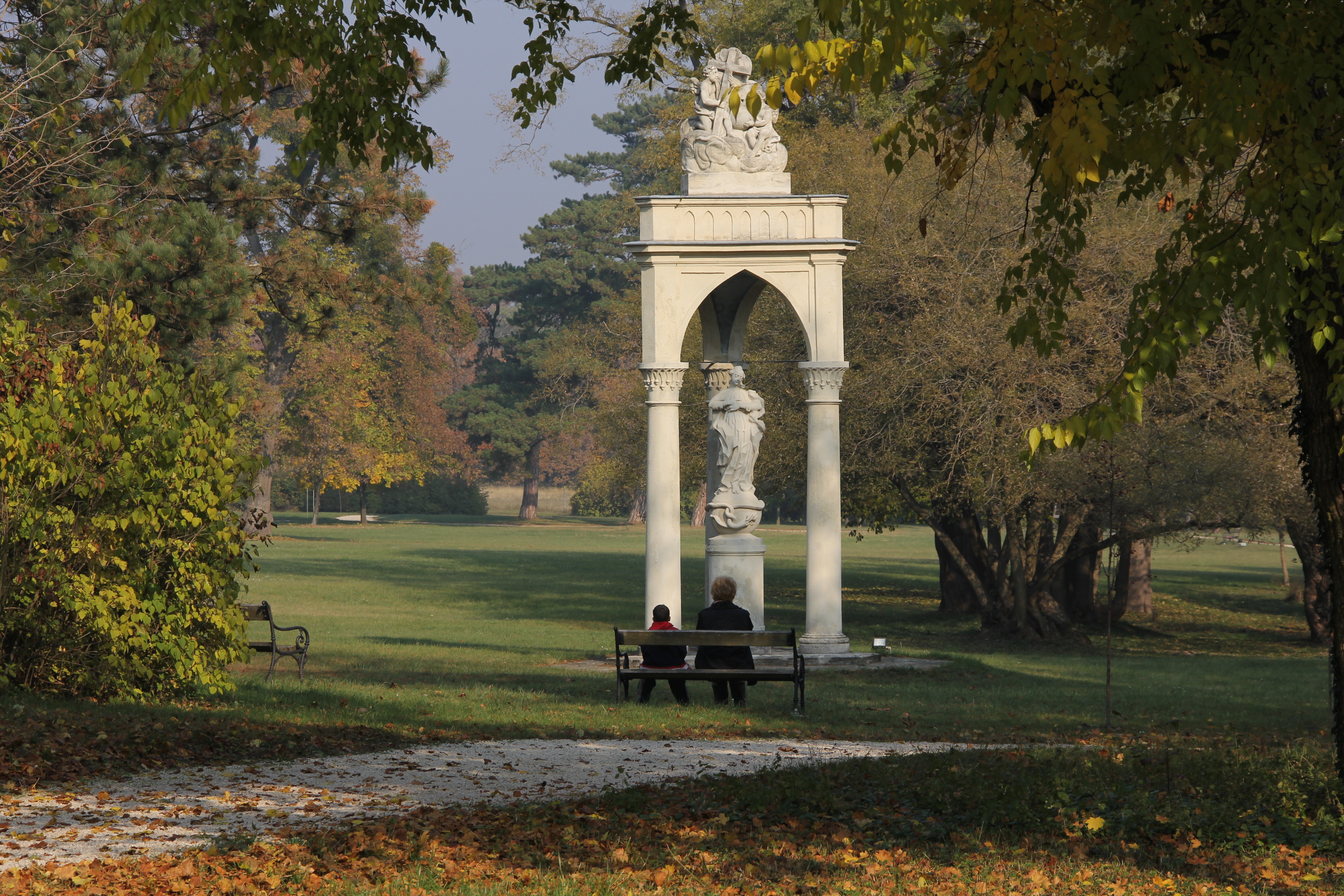 Esterházy-kastély parkja, Csákvár This is a photo of a monument in Hungary. Identifier: 13215